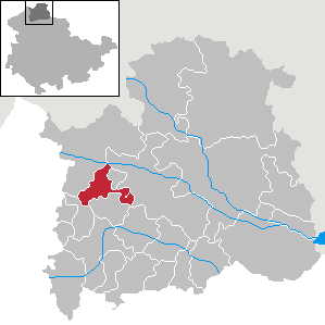 Gemeinde Friedrichsthal in Thüringen, Landkreis Nordhausen